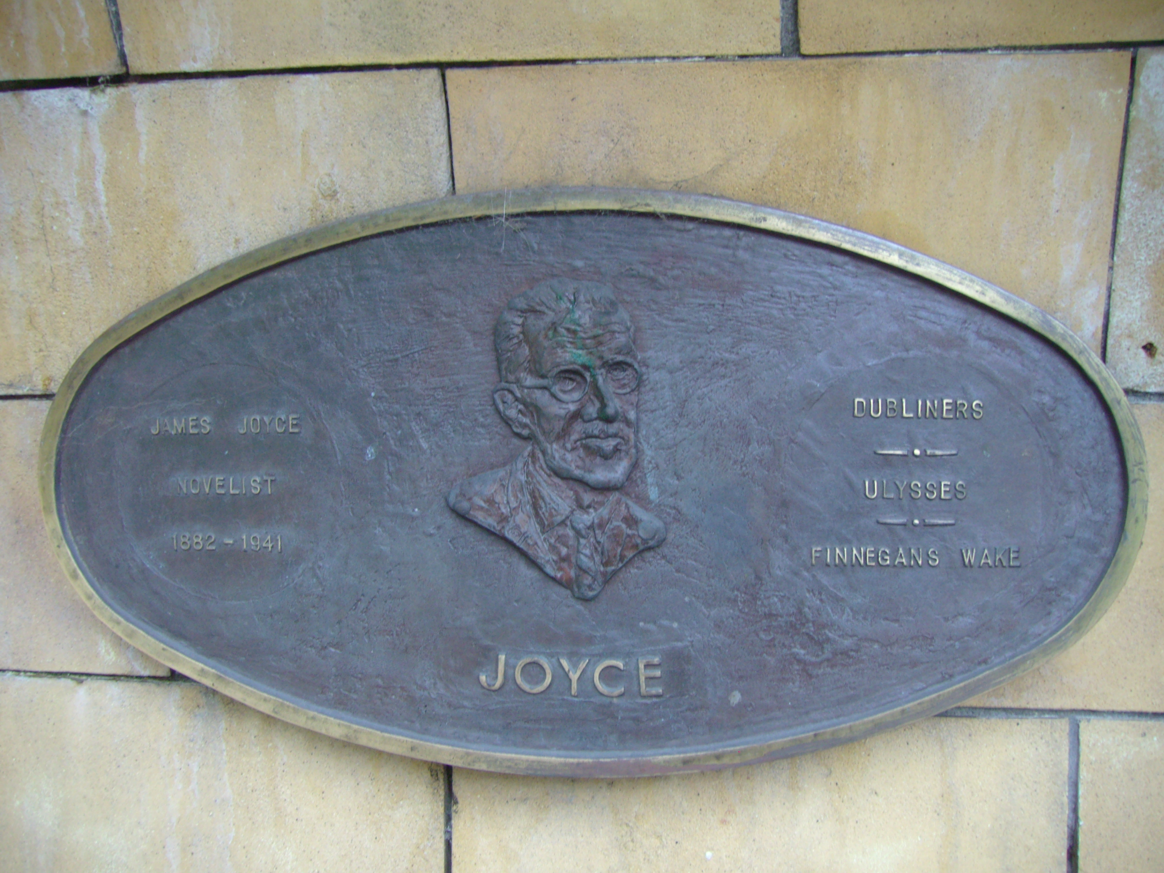 James Joyce (1882–1941), irischer Dichter; Plakette im Saint Patrick's Park, Dublin, dort angebracht anlässlich der Dublin Millennium 988–1988 Literary Parade